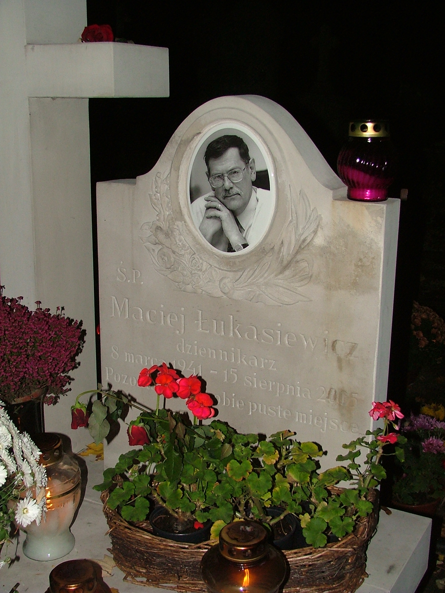 Cmentarz Powązkowski w Warszawie. Grób dziennikarza Macieja Łukasiewicza.